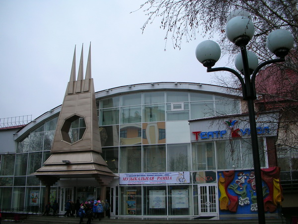 La Tjumena provinca teatro de pupoj kaj maskoj (Tjumeno, Rusio) Тюменский театр кукол и масок (ул. Кирова)